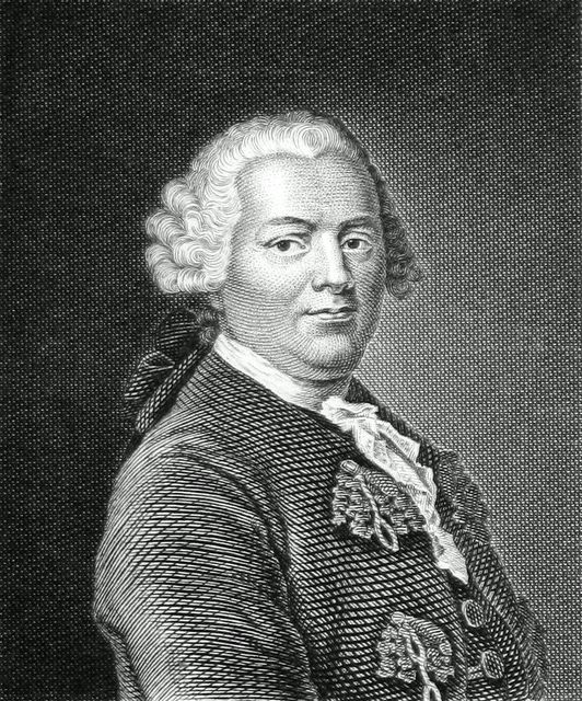 Gottlieb Wilhelm Rabener, German writer